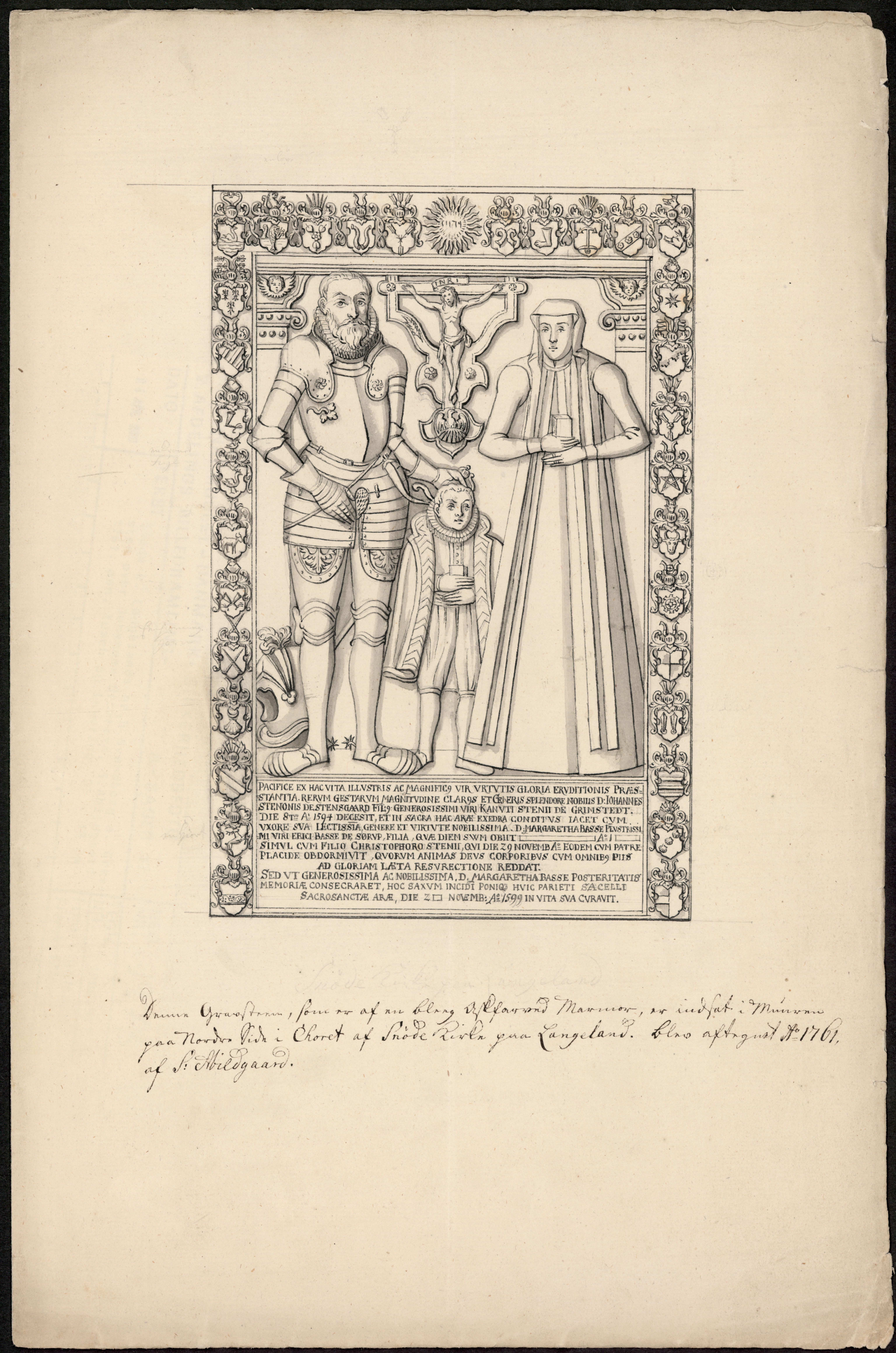 Snøde kirke. Gravsten over Johannes Steensen Snøde sogn, Langelands Nørre hrd., Svendborg amt